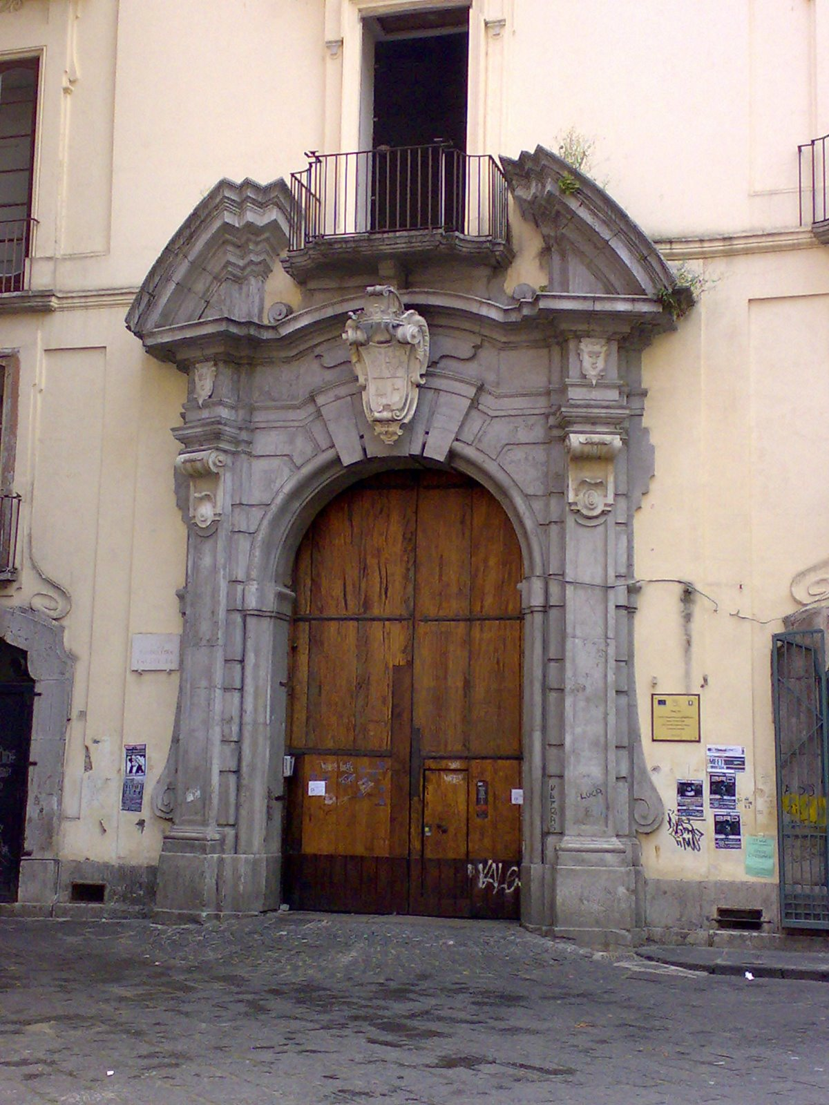 Portone del Palazzo Genovese in Largo Sedile del Campo in Salerno (Italy)